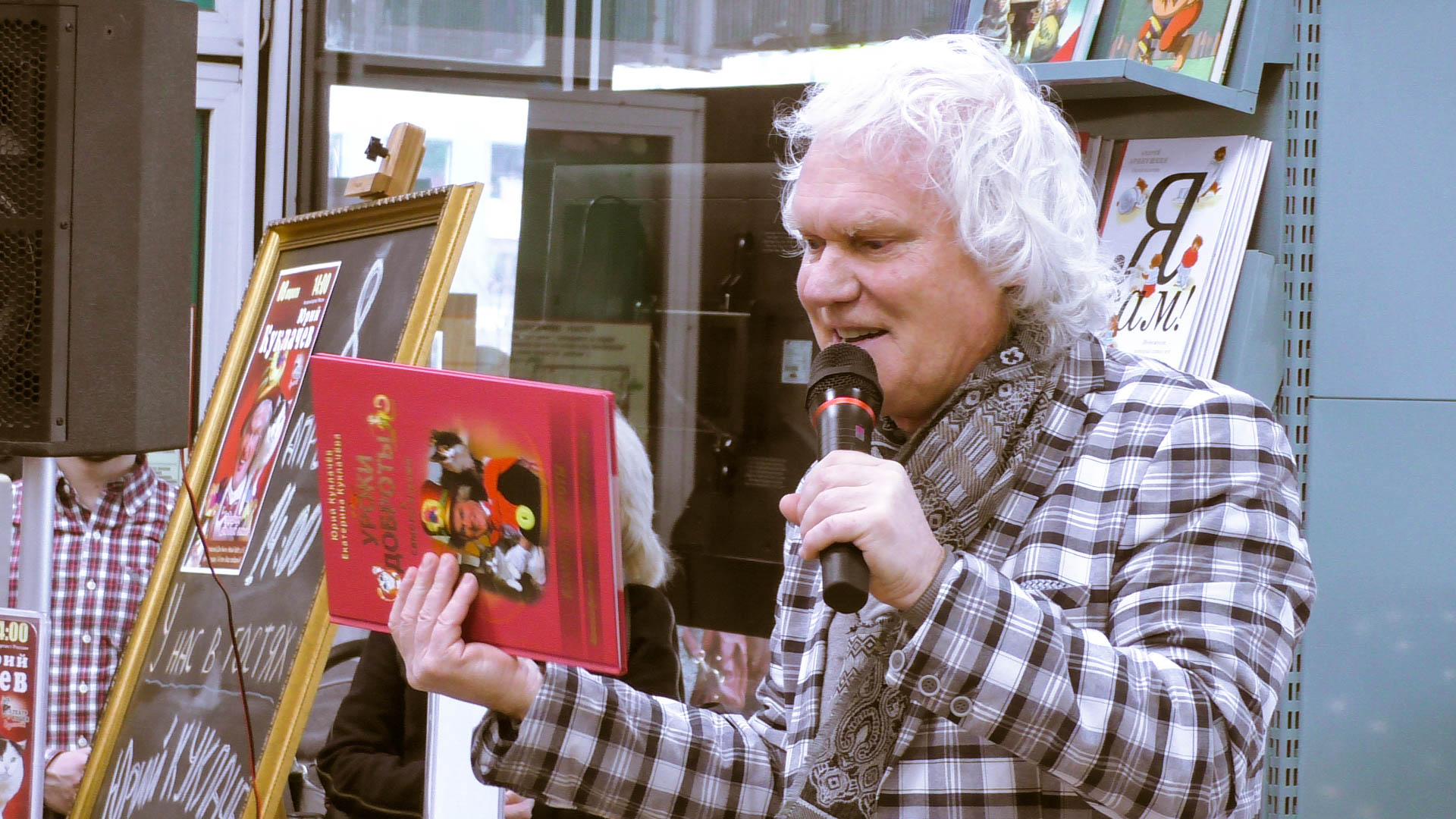 Юрий Куклачёв в Московском Доме Книги 08.04.2017.